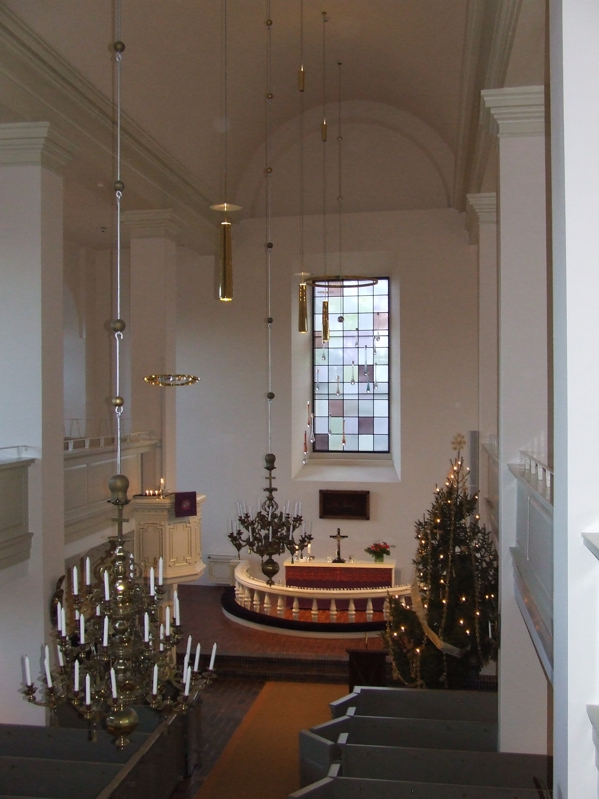 Näkymä Haminan Marian kirkon urkuparvelta kohti alttaria